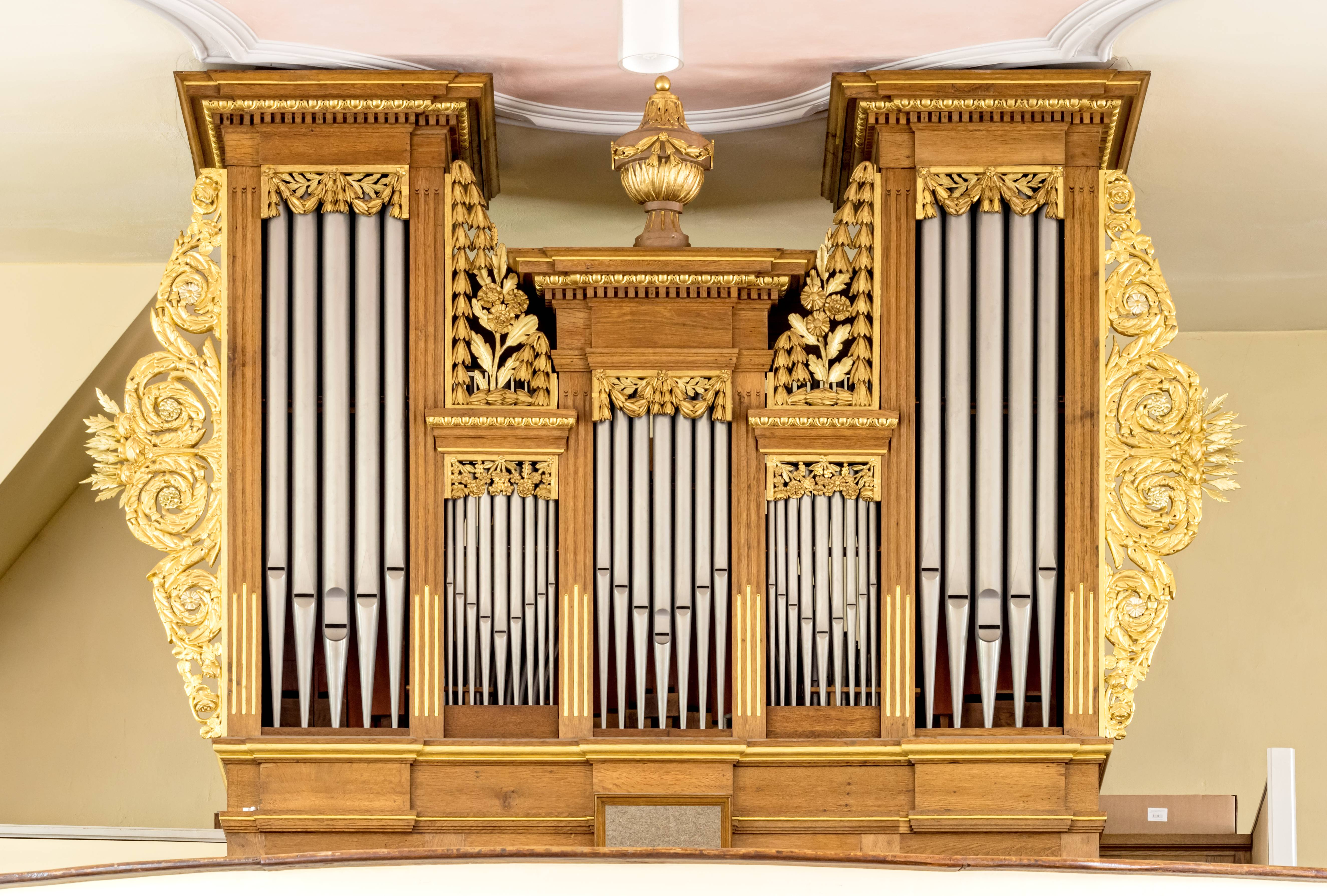 Bilder von der Kirche St. Romanus in Schweighausen Die Orgel